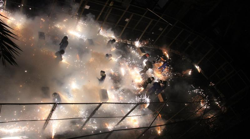 Se dispararon 220 docenas de cohetes en l’Entrà y 330 en la cordà